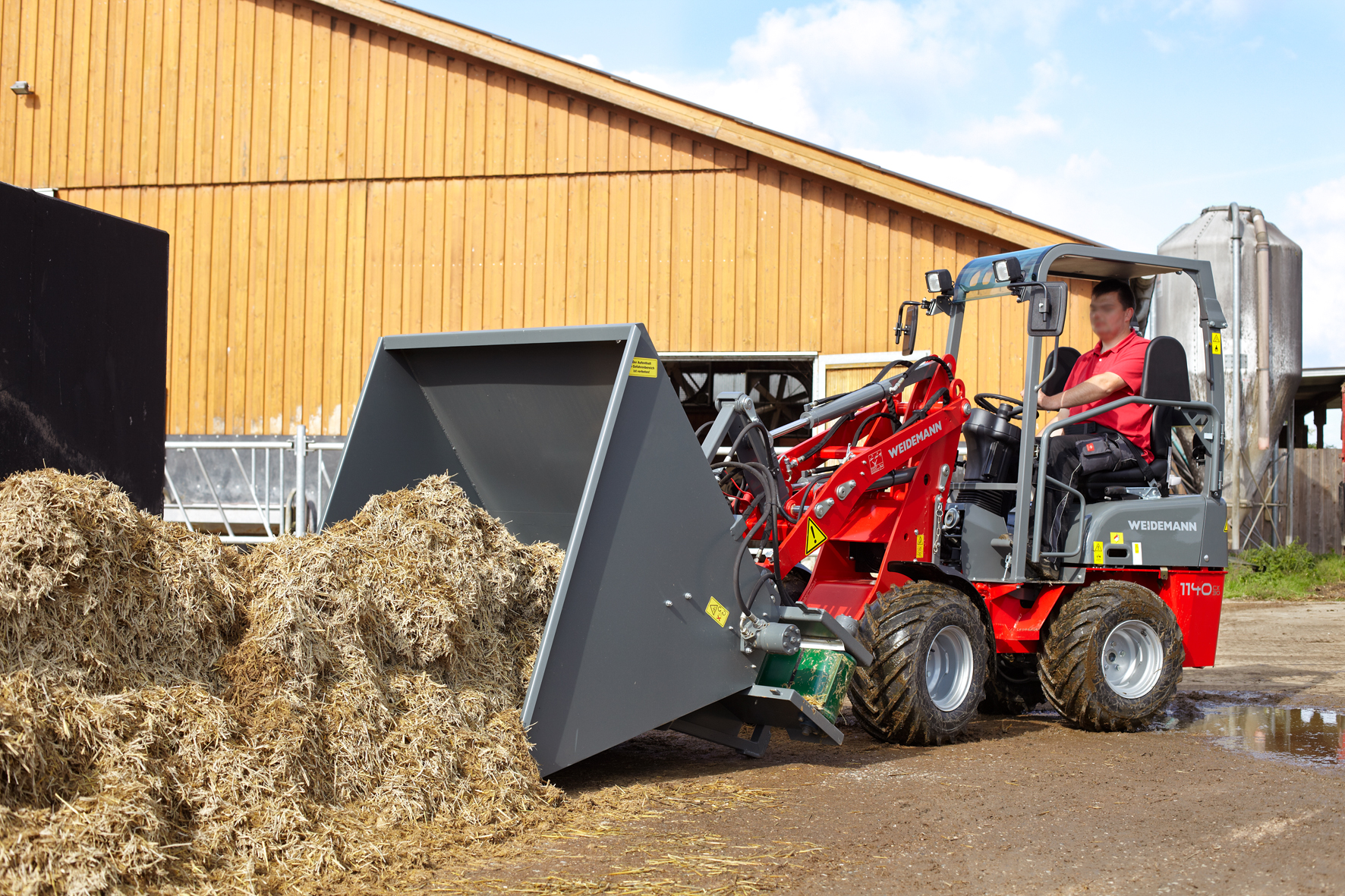 Weidemann Hoftrac 1140 CX30 im Einsatz auf einem Bauernhof